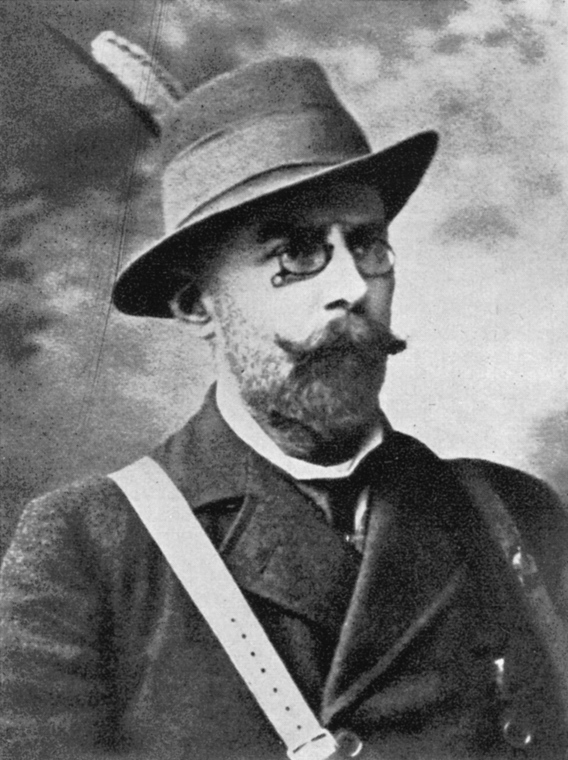 Gustav Victor Finger